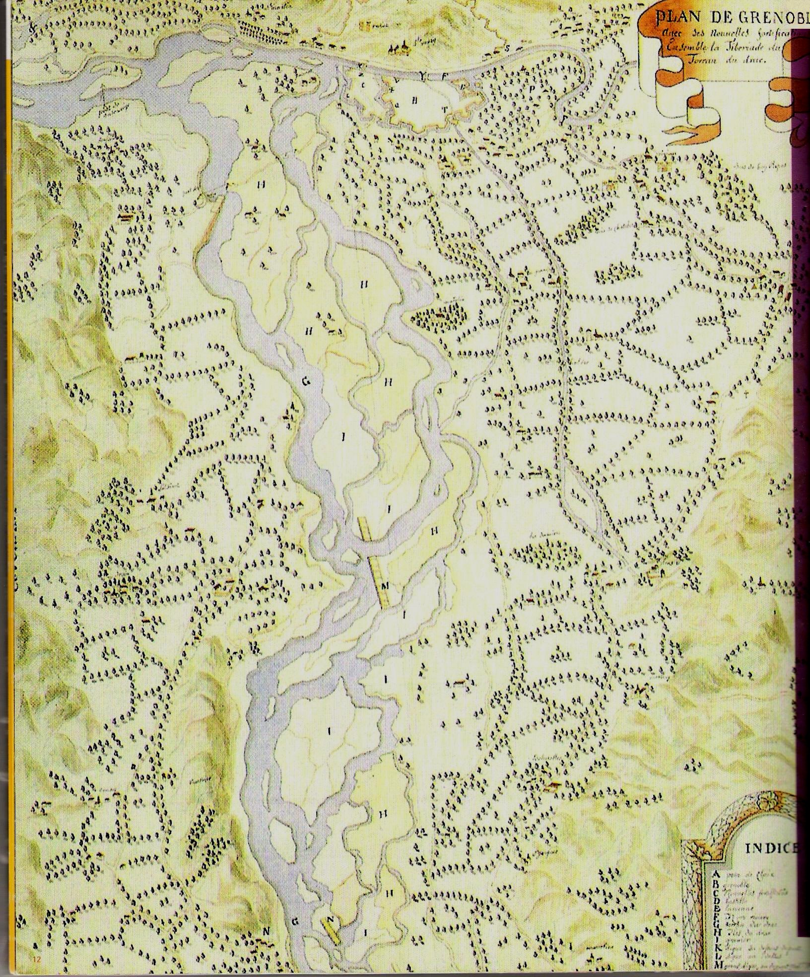 Plan de 1660 de Grenoble. L'enceinte fortifiée de la ville est en haut sur les bords de L'Isère. La rivière Drac avait deux bras à l'époque et rejoignait l'Isère au niveau de l'actuelle place Hubert Dubedout.